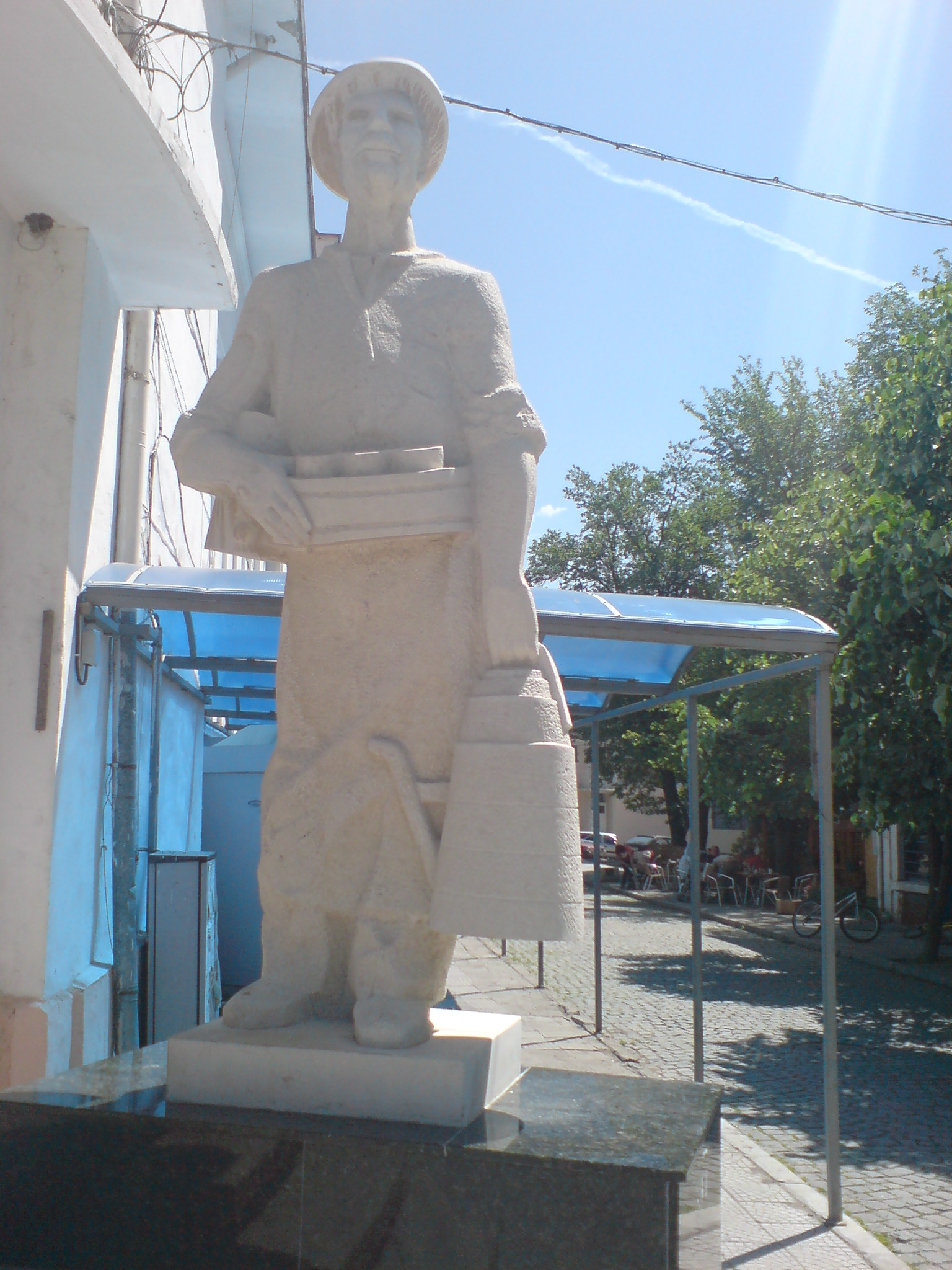 Boza seller's statue in Radomir, Bulgaria